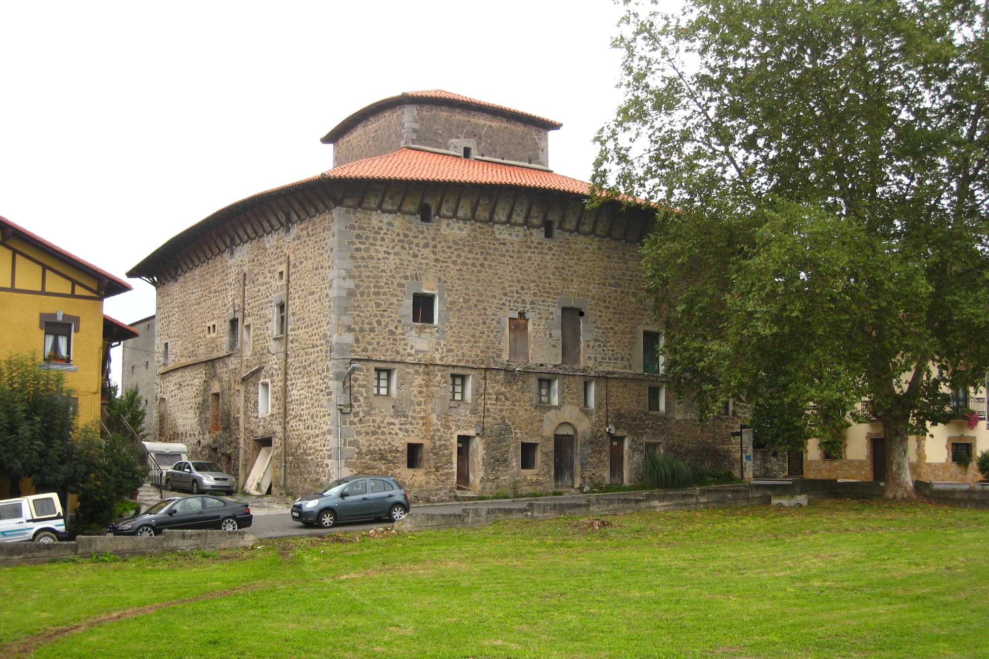 Izturitzatorre jauregia